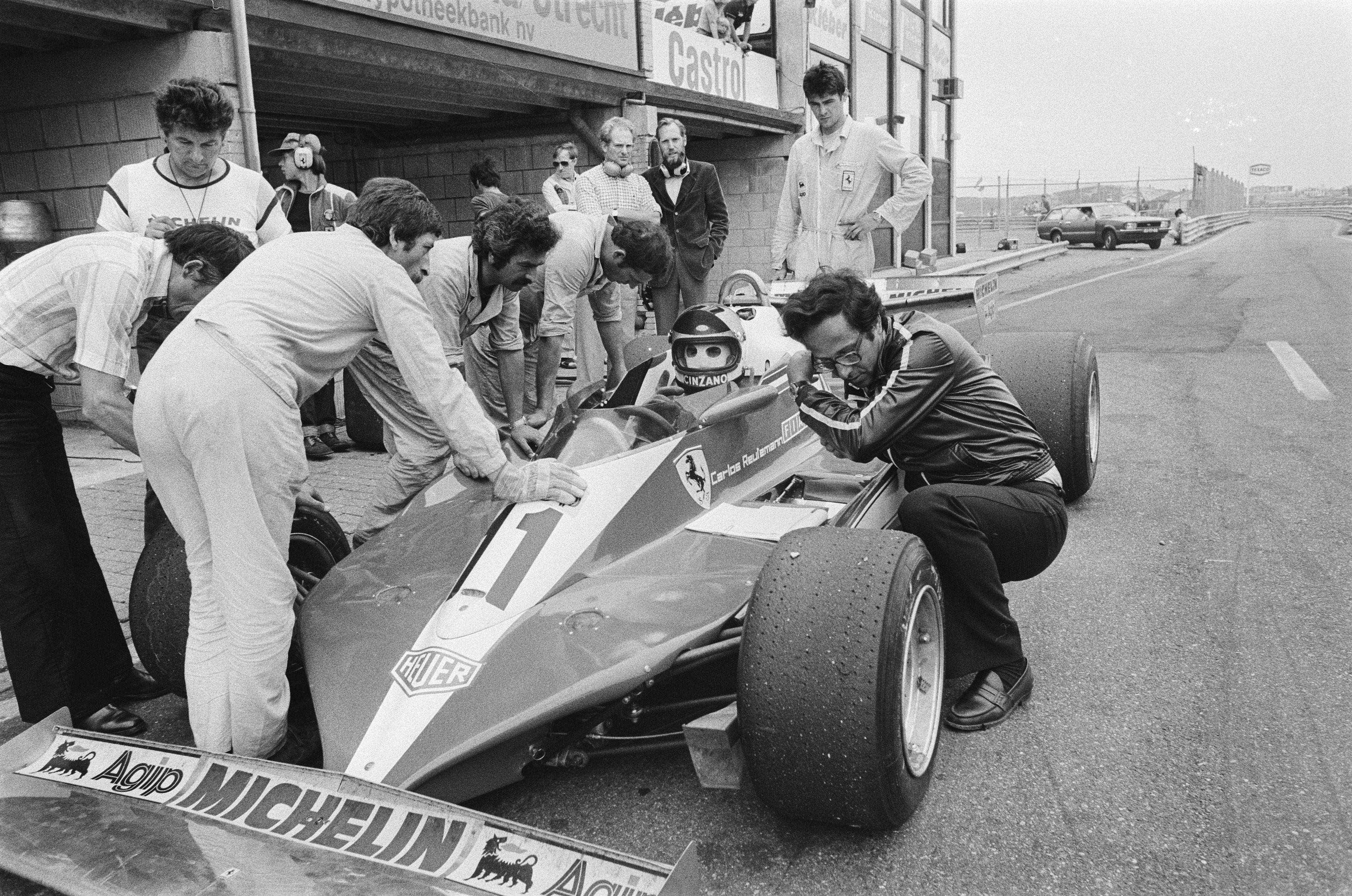 Collectie / Archief : Fotocollectie Anefo Reportage / Serie : [ onbekend ] Beschrijving : In verband met Formule I race Zandvoort (27-8) vandaag testen van de banden; Carlos Reutemann tijdens stop Annotatie : Knielend naast de bolide assisteert technisch directeur Mauro Forghieri. Datum : 1 augustus 1978 Locatie : Noord-Holland, Zandvoort Trefwoorden : autoraces, autosport, trainingen Persoonsnaam : Reutemann, Carlos Fotograaf : Verhoeff, Bert / Anefo Auteursrechthebbende : Nationaal Archief Materiaalsoort : Negatief (zwart/wit) Nummer archiefinventaris : bekijk toegang 2.24.01.05 Bestanddeelnummer : 929-8404